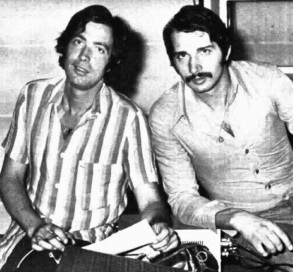 Italian composers Guido & Maurizio De Angelis